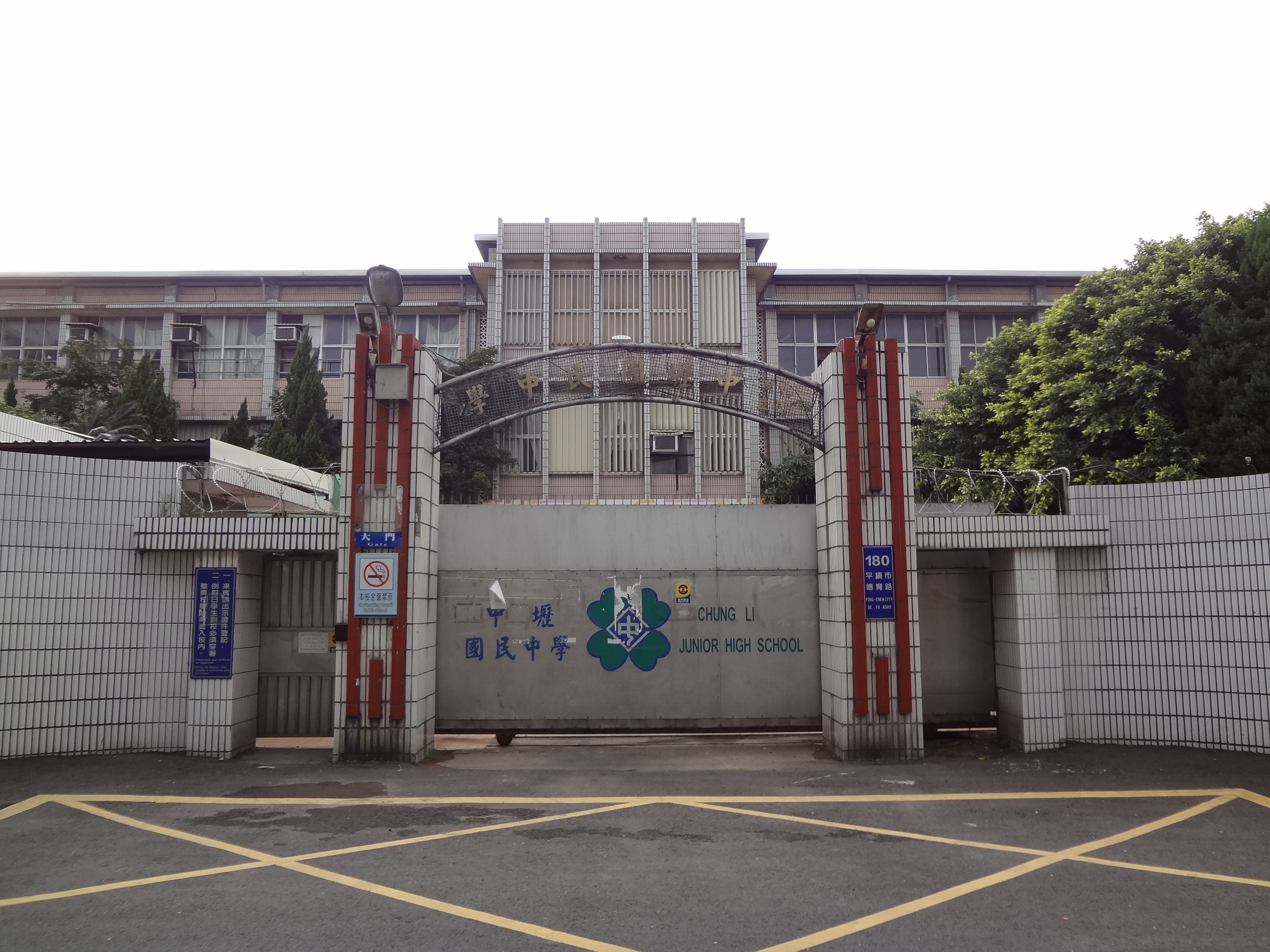 桃園縣立中壢國民中學大門，位於臺灣桃園縣平鎮市德育路180號。